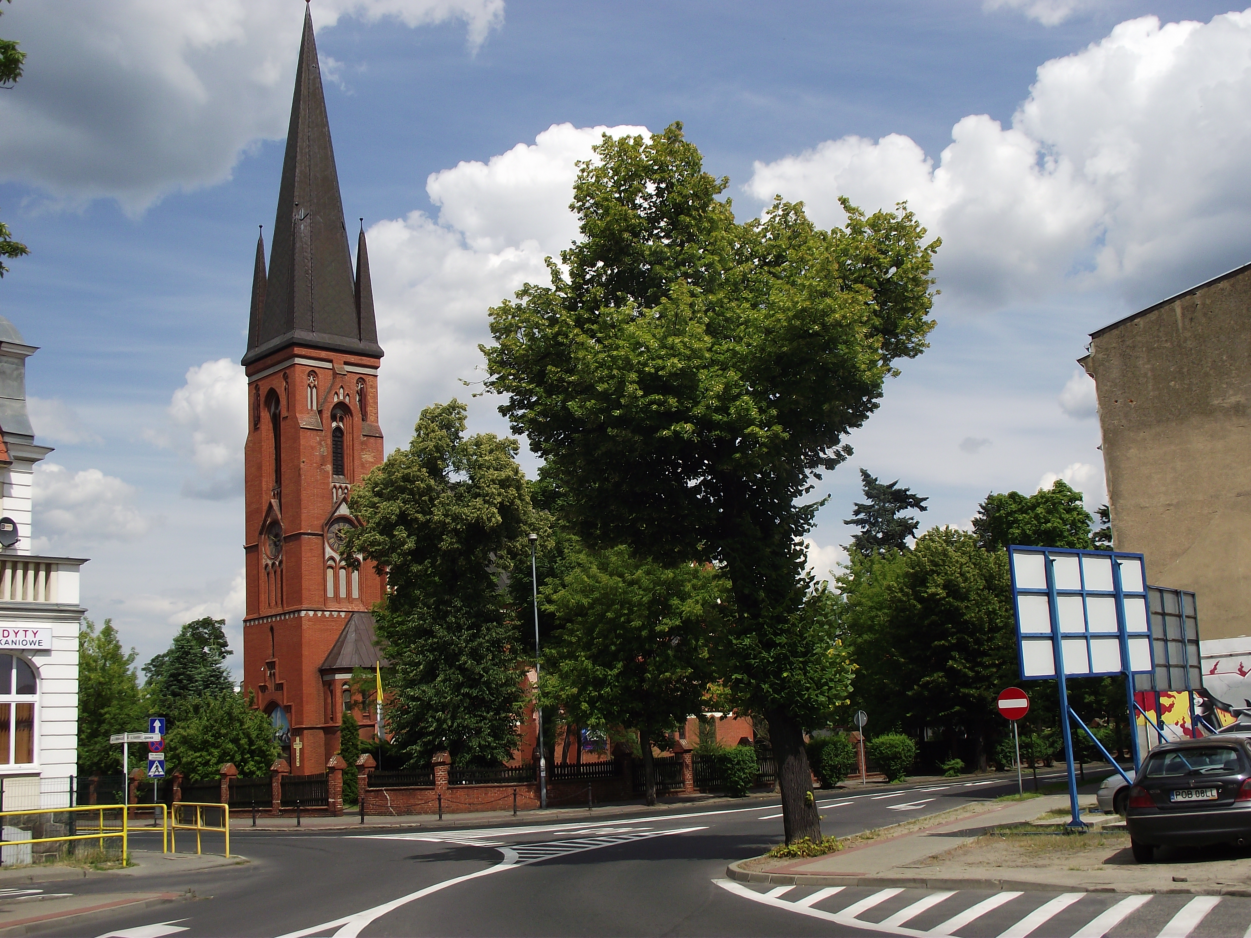 Oborniki - kościół św. Jozefa.